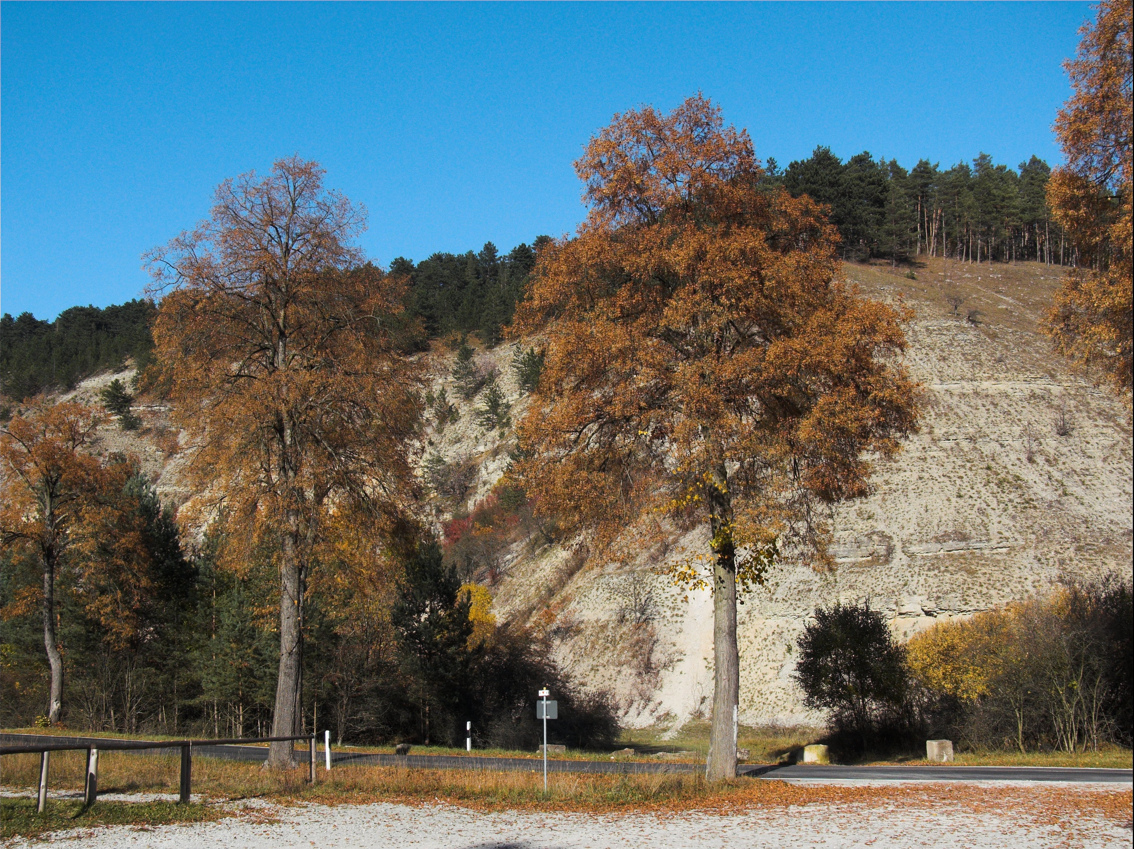 Das Jonastal bei Arnstadt im Herbst